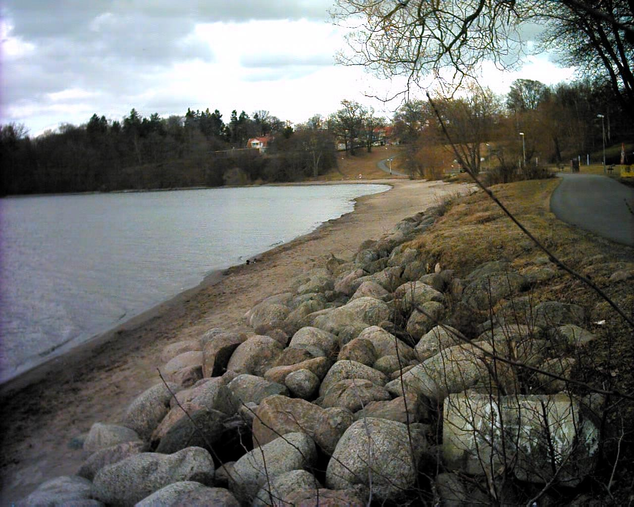 Vätterstranden vid Strand. Början av Rosenlunds-bankarna i bakgrunden. Photo taken by User:Boivie in Jönköping 7 April 2006